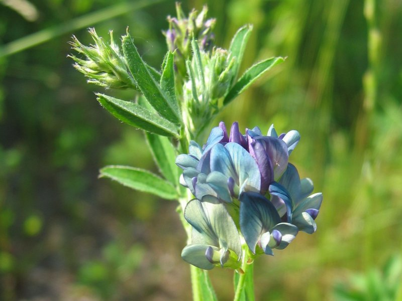 Bastard-Luzerne Medicago x varia, Zingst